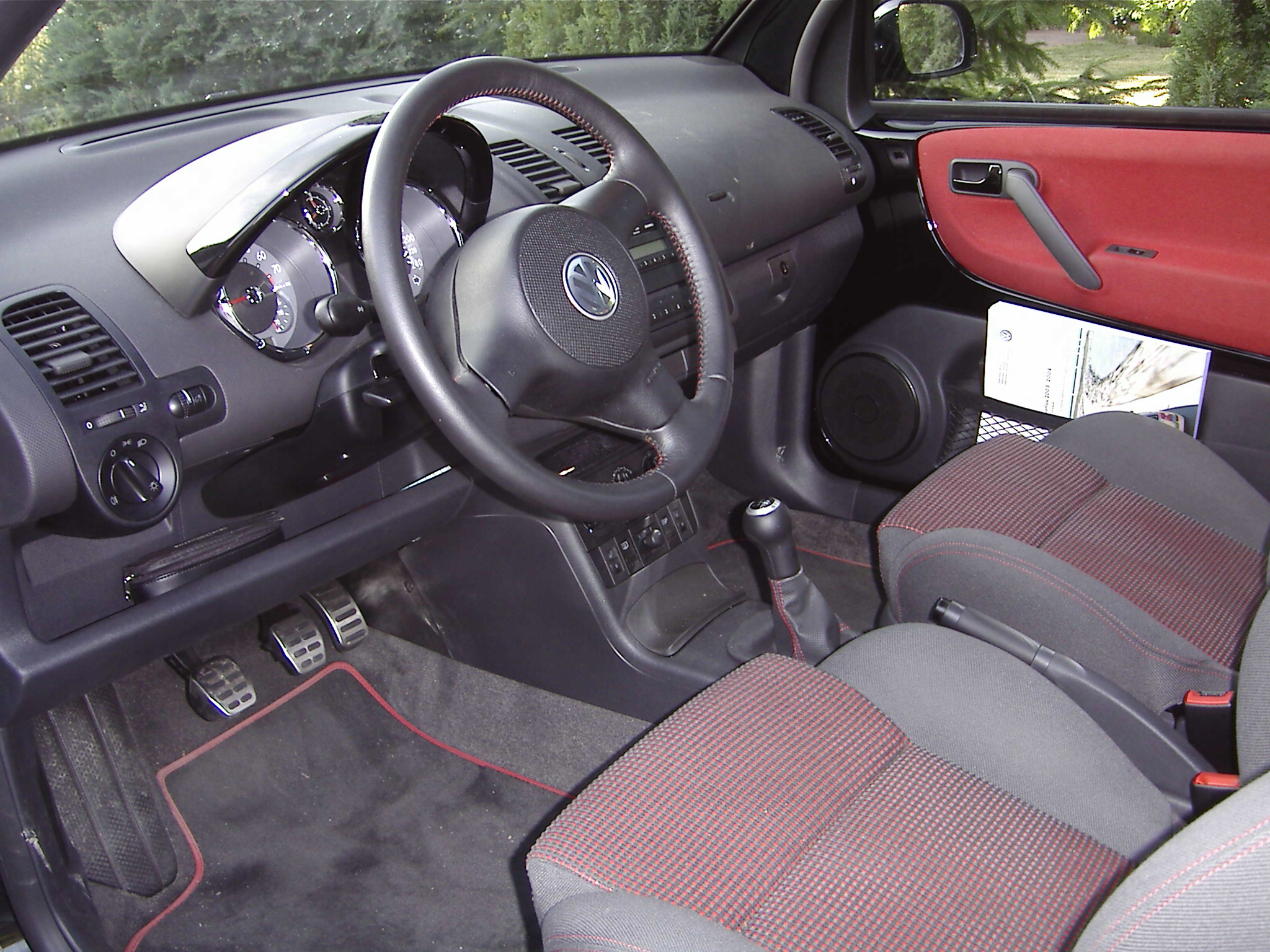 "Innenraum des Lupo GTI" - Einer der zuletzt gebauten Volkswagen Lupo GTI im Juni 2005